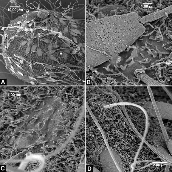 bovine fertilization